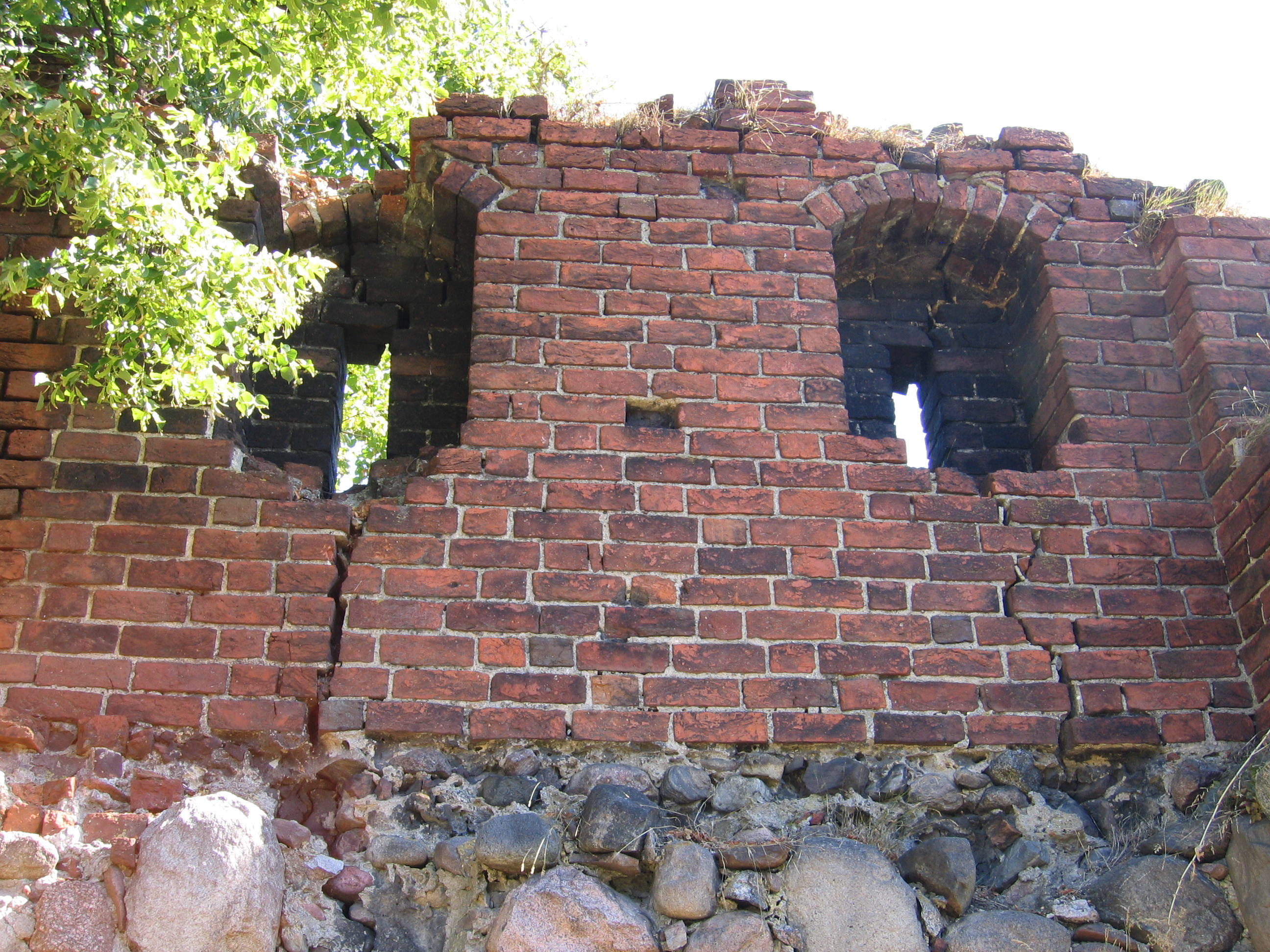 Lipiany - pozostałości murów obronnych